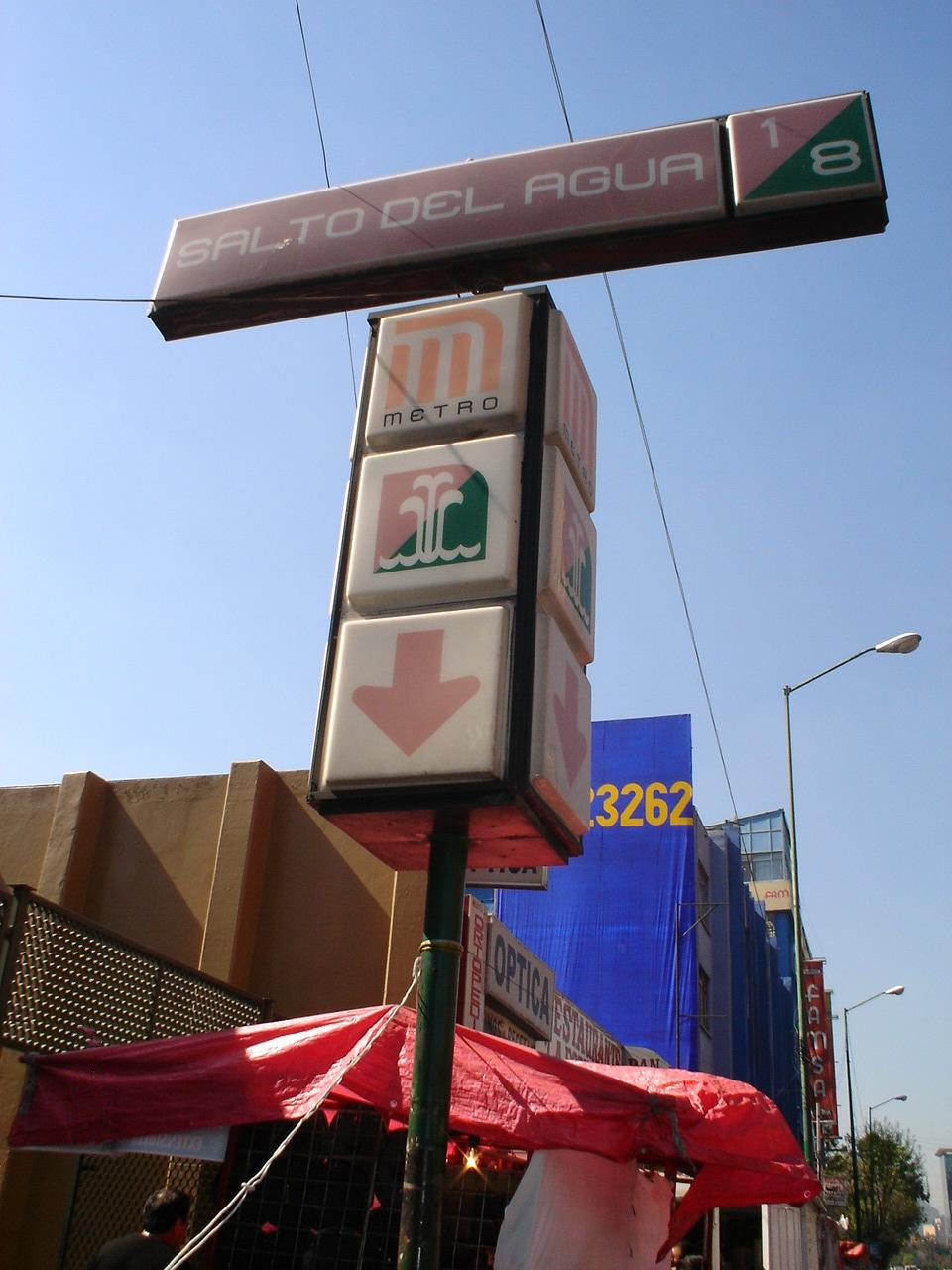 Estacion Salto del Agua — del Metro (lineas 1 y 8), en el barrio Salto del Agua, del centro historico de Ciudad de México.